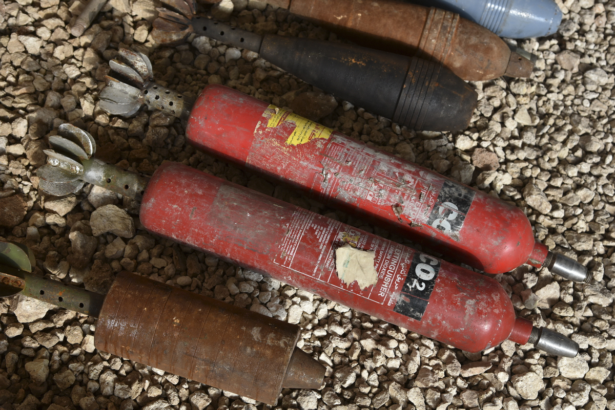 Работа сапёров Международного противоминного центра Министерства обороны России в Алеппо (Сирия)